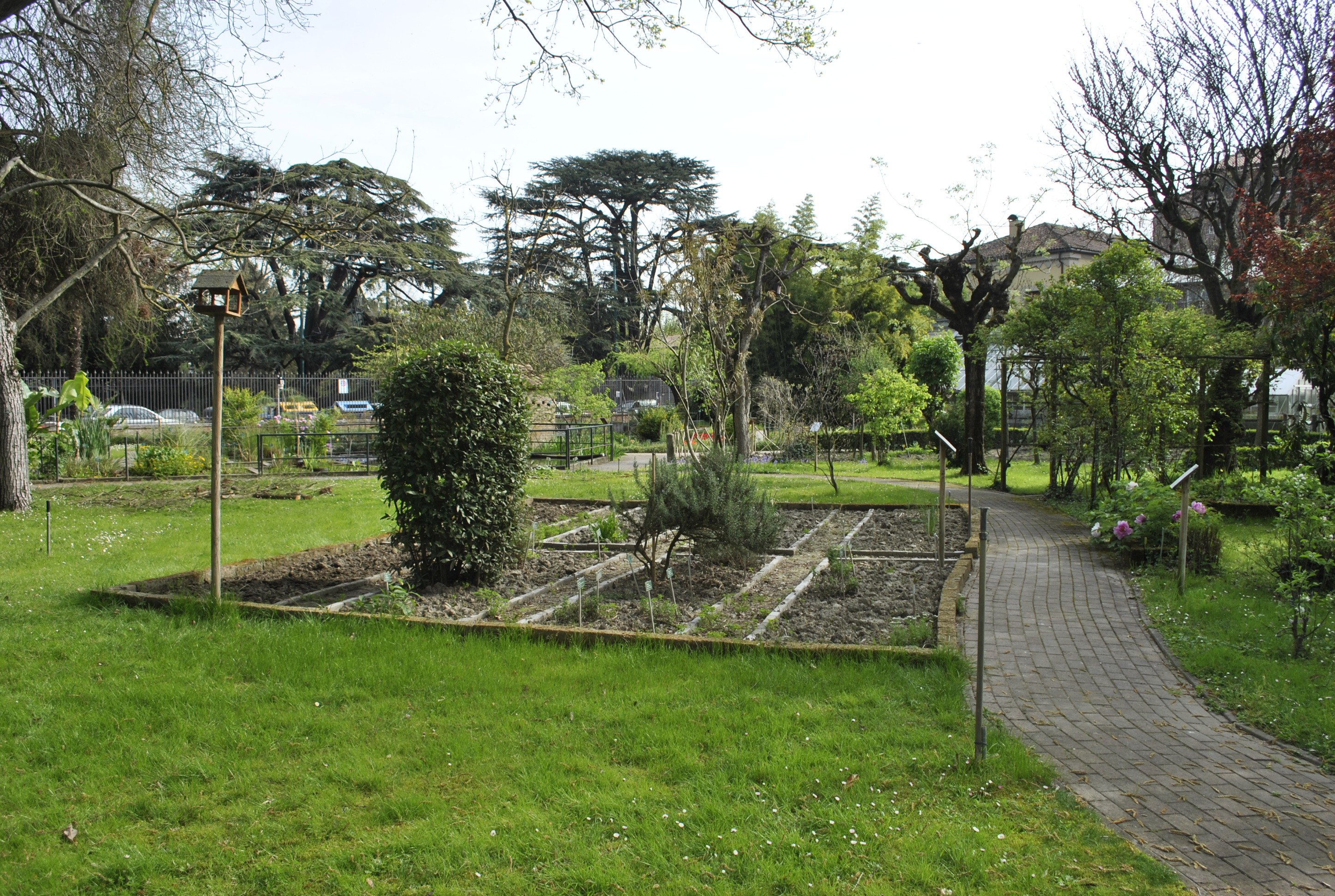 Interno dell'orto Botanico dell'Università di Ferrara situato nel giardino di Palazzo Turchi di Bagno.